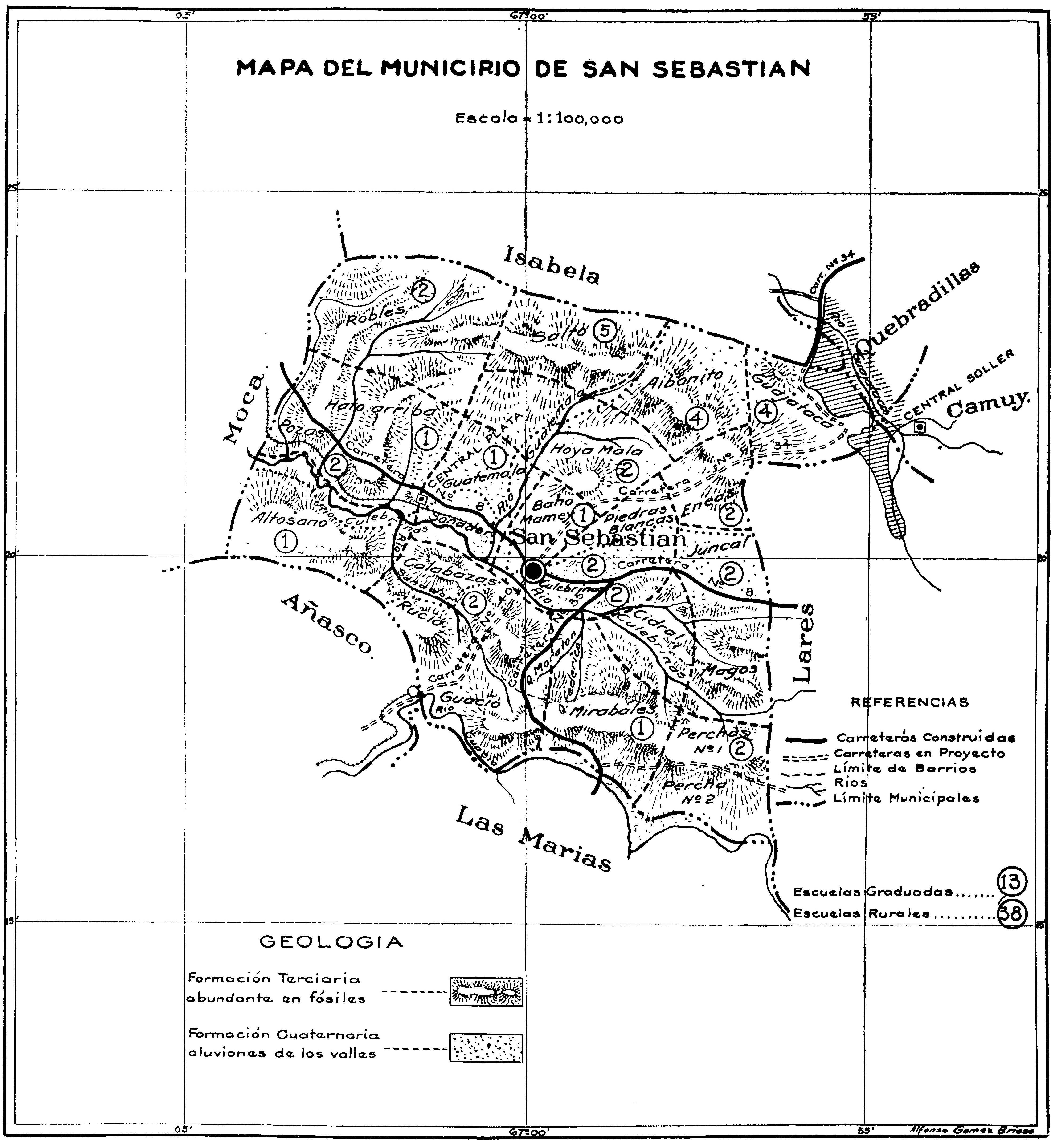 Mapa de San Sebastián. Gobierno de Puerto Rico, Departamento del Interior, Negociado de obras publicas, San Juan, Puerto Rico, Febrero 1929